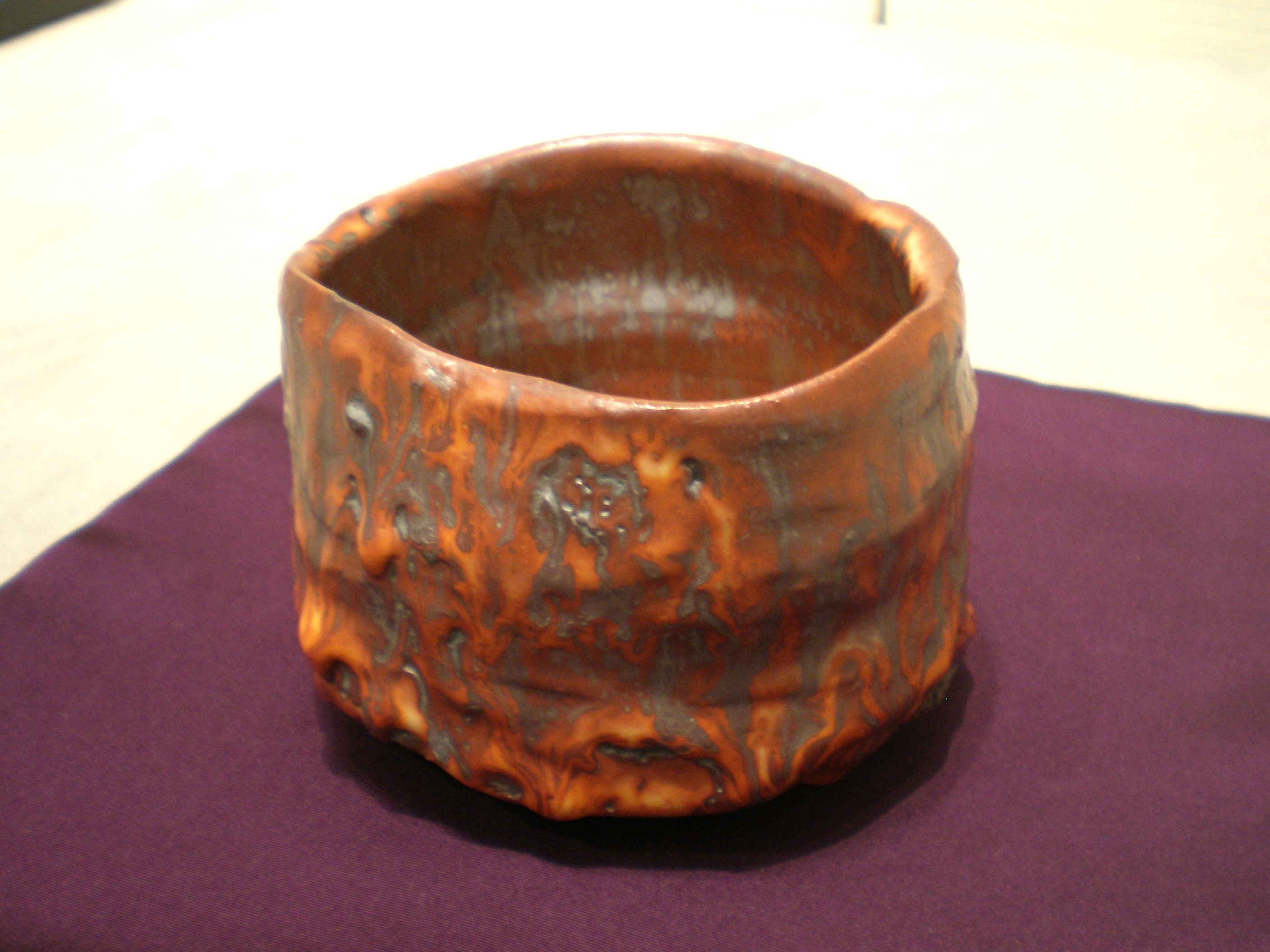 越前陶芸村で活動されている、陶芸家・山田和氏の作品。2011年9月10日、JR大阪三越伊勢丹・美術画廊での個展を撮影。